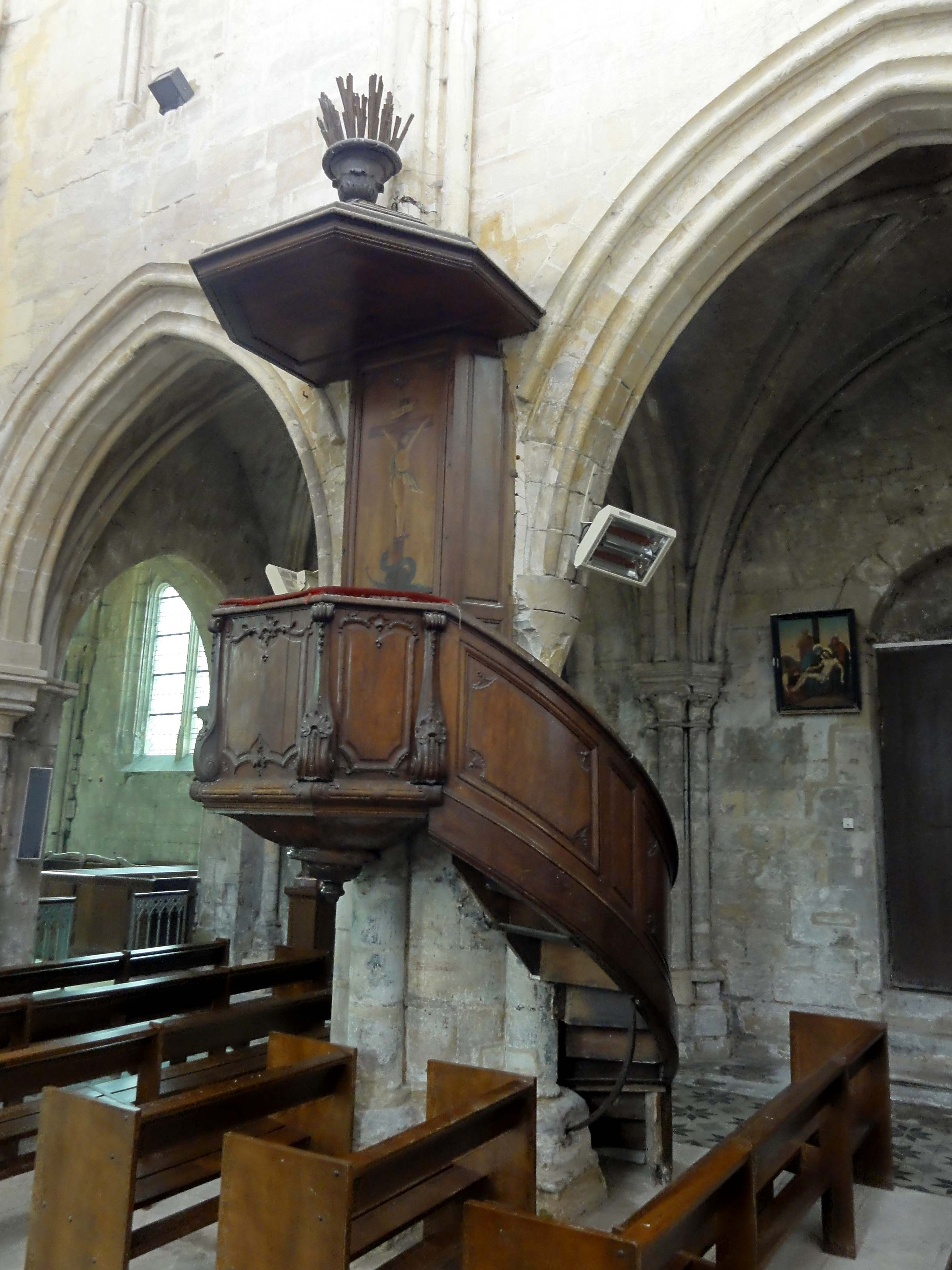 Mobilier de l'église Saint-Martin de Cires-lès-Mello (voir titre).